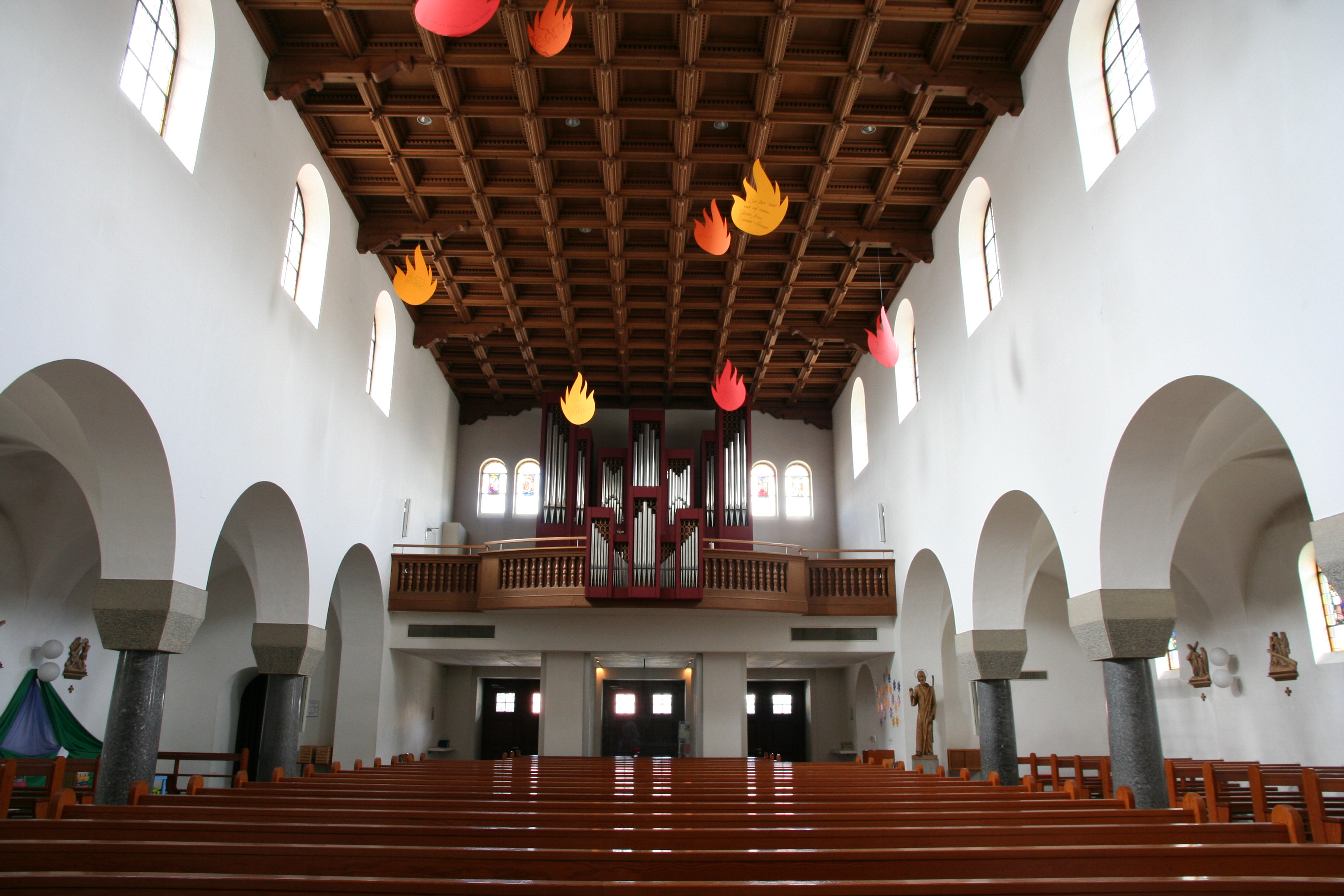 Römisch-katholische Pfarrkirche St. Margareten Wald, Blick zur Orgelempore